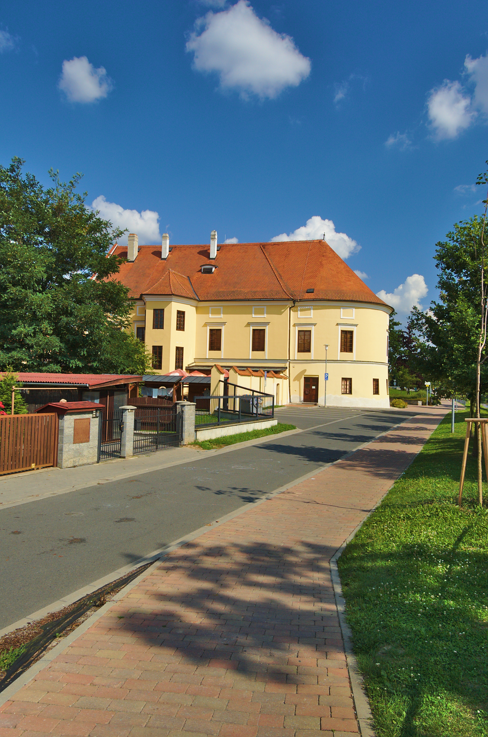 Muzeum - bývalá střelnice, čp. 795, Smyčkova, Litovel, okres Olomouc